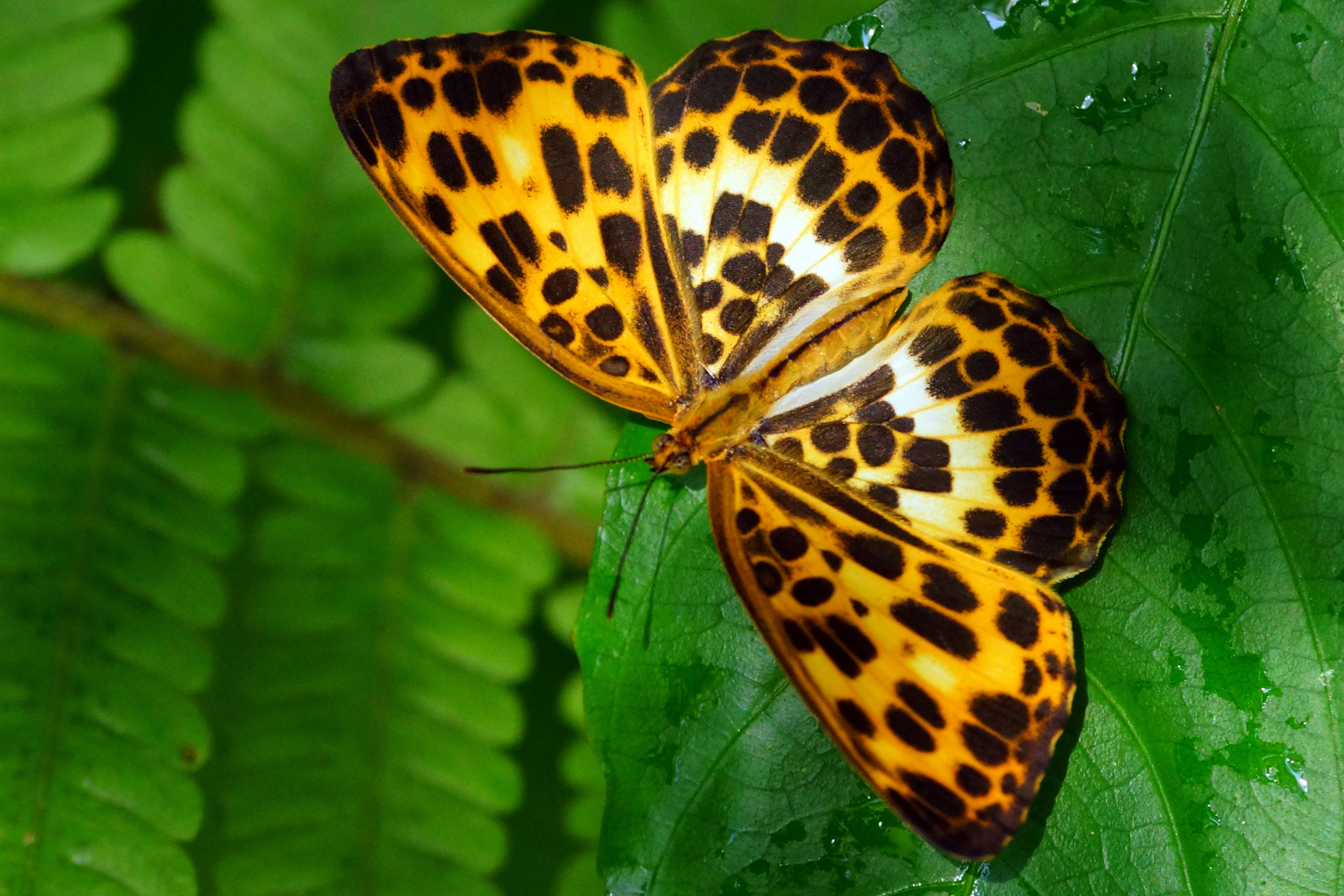 白裳貓蛺蝶 Timelaea albescens formosana